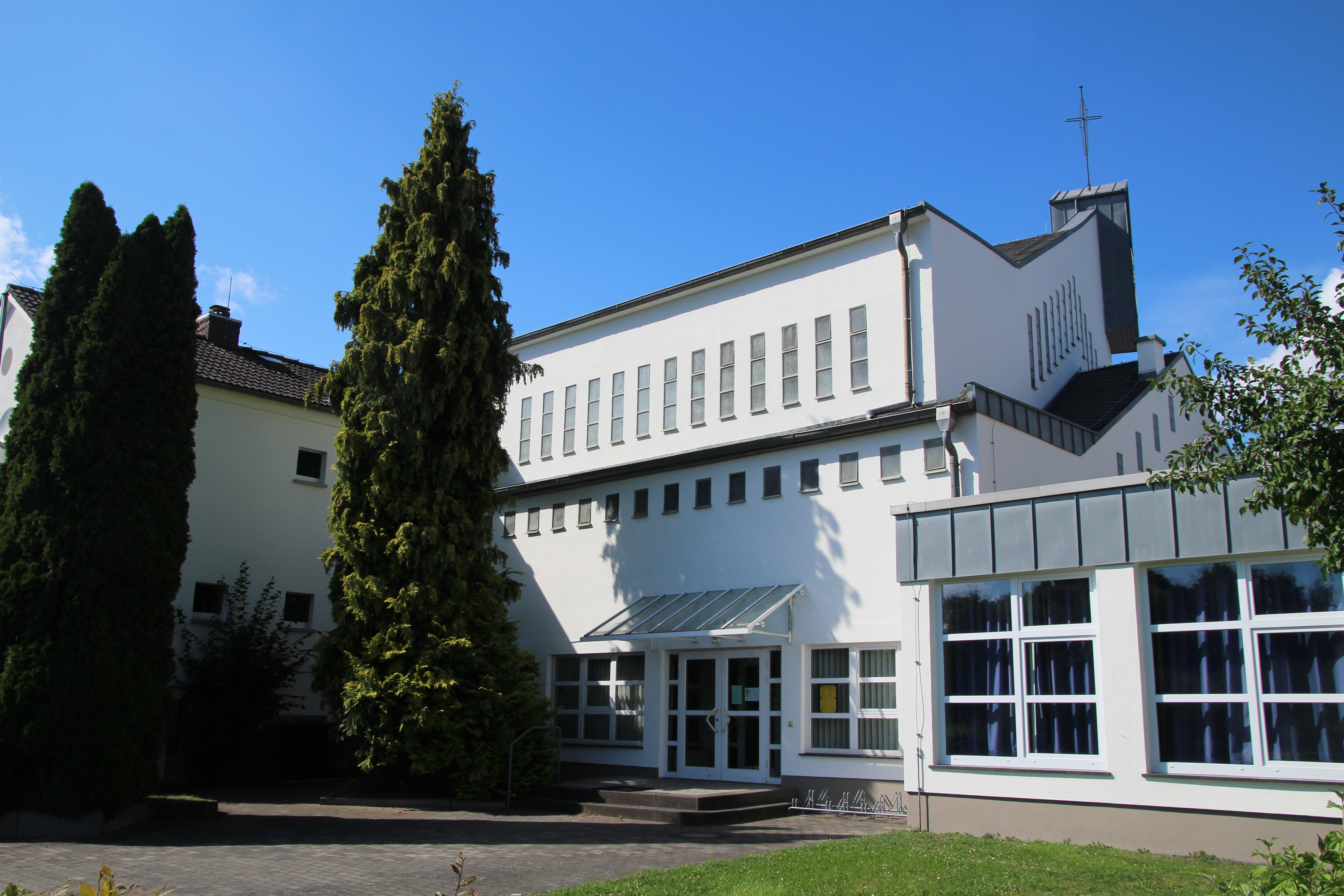 Siehe Foto, Dateiname, Kats u. ggf. Geo-Koords